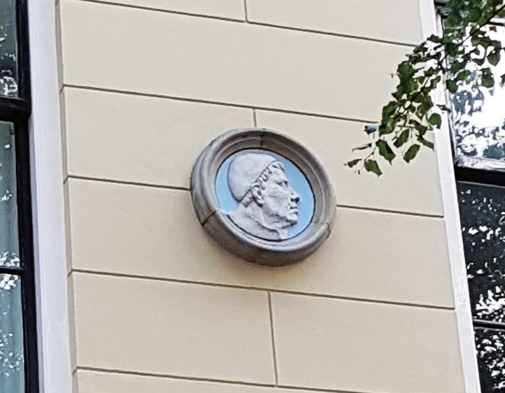 Deze medaillon toont een fantasieportret van Geert Grote; over zijn werkelijke uiterlijk is niets bekend. Het medaillon bevindt zich op de voormalige Latijnse School te Deventer aan het Grote Kerkhof. Het werd in 1992 bij de renovatie van het pand geplaatst en is van de hand van Ela Venbroek-Franczyk. Geert Grote was leerling aan de Kapittelschool, de voorloper van de Latijnse school, die zich bij de Lebuïnuskerk bevond.